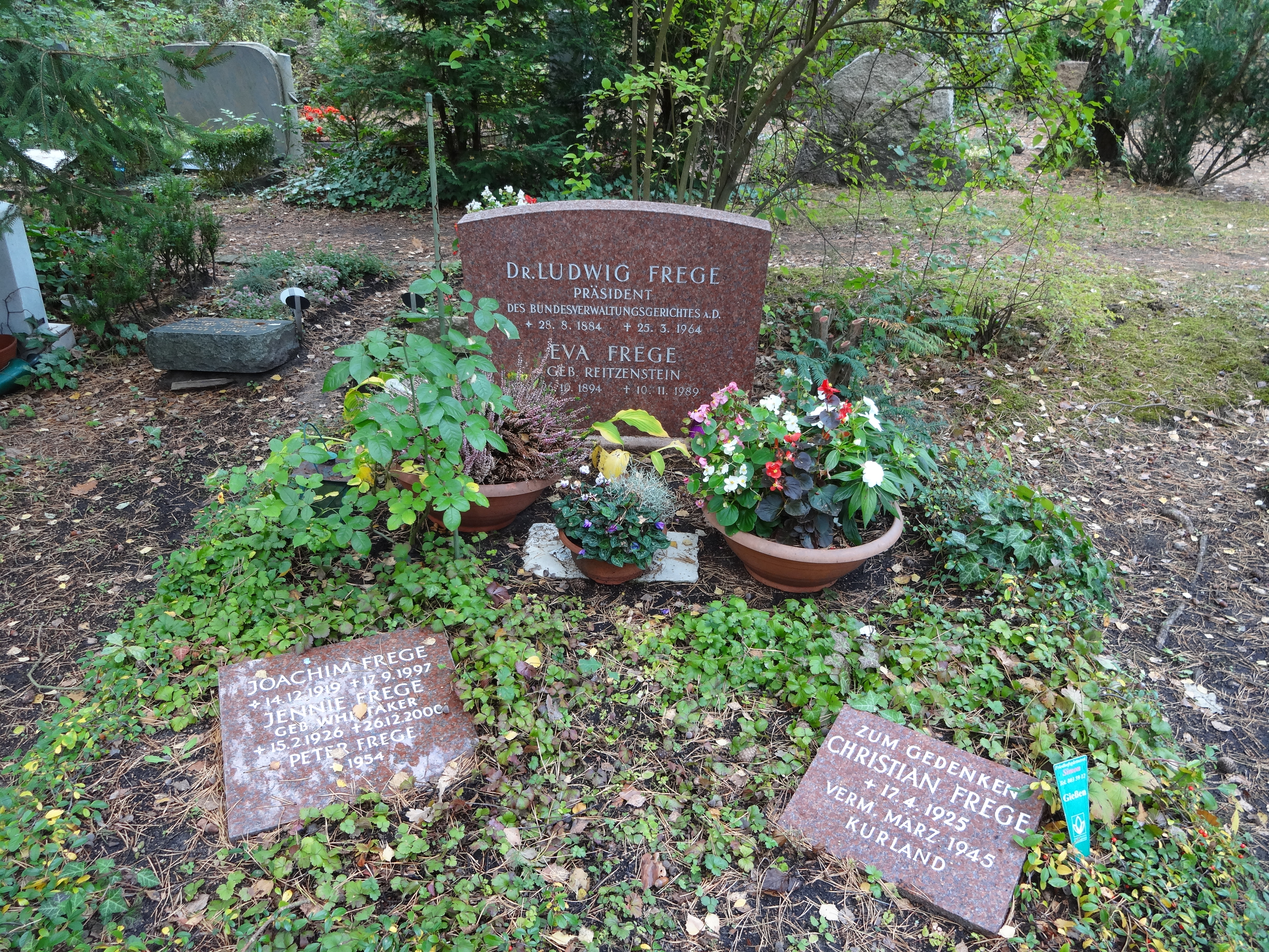 Grab von Ludwig Frege (Präsident des Bundesverwaltungsgerichts) auf dem Waldfriedhof Zehlendorf